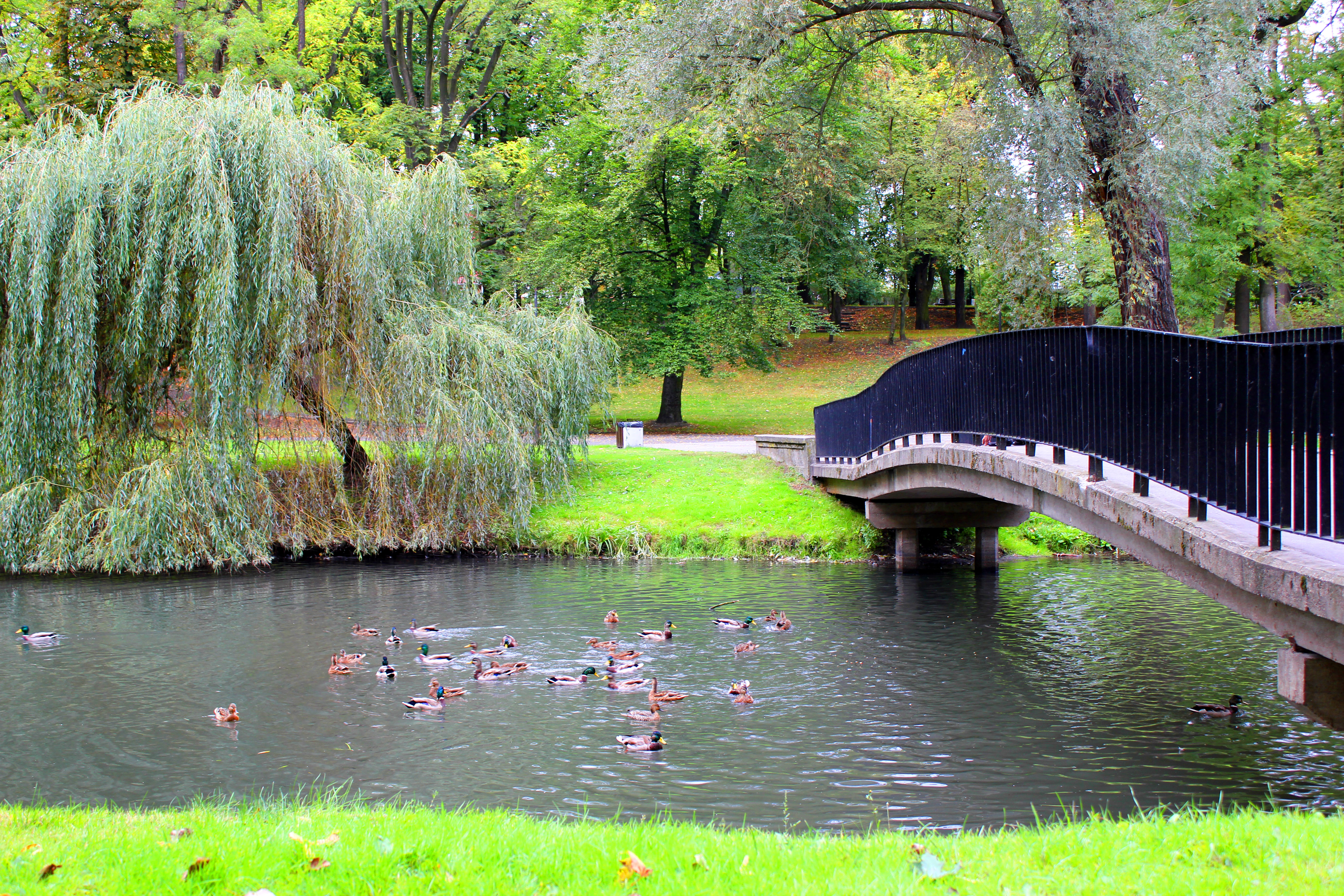 park miejski im. H. Sienkiewicza, XIX/XX Włocławek, miasto Włocławek